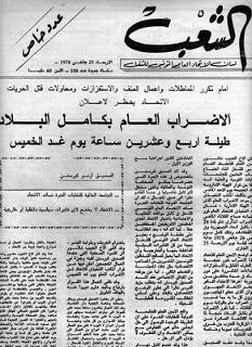 Jeudi noir (Tunisie)